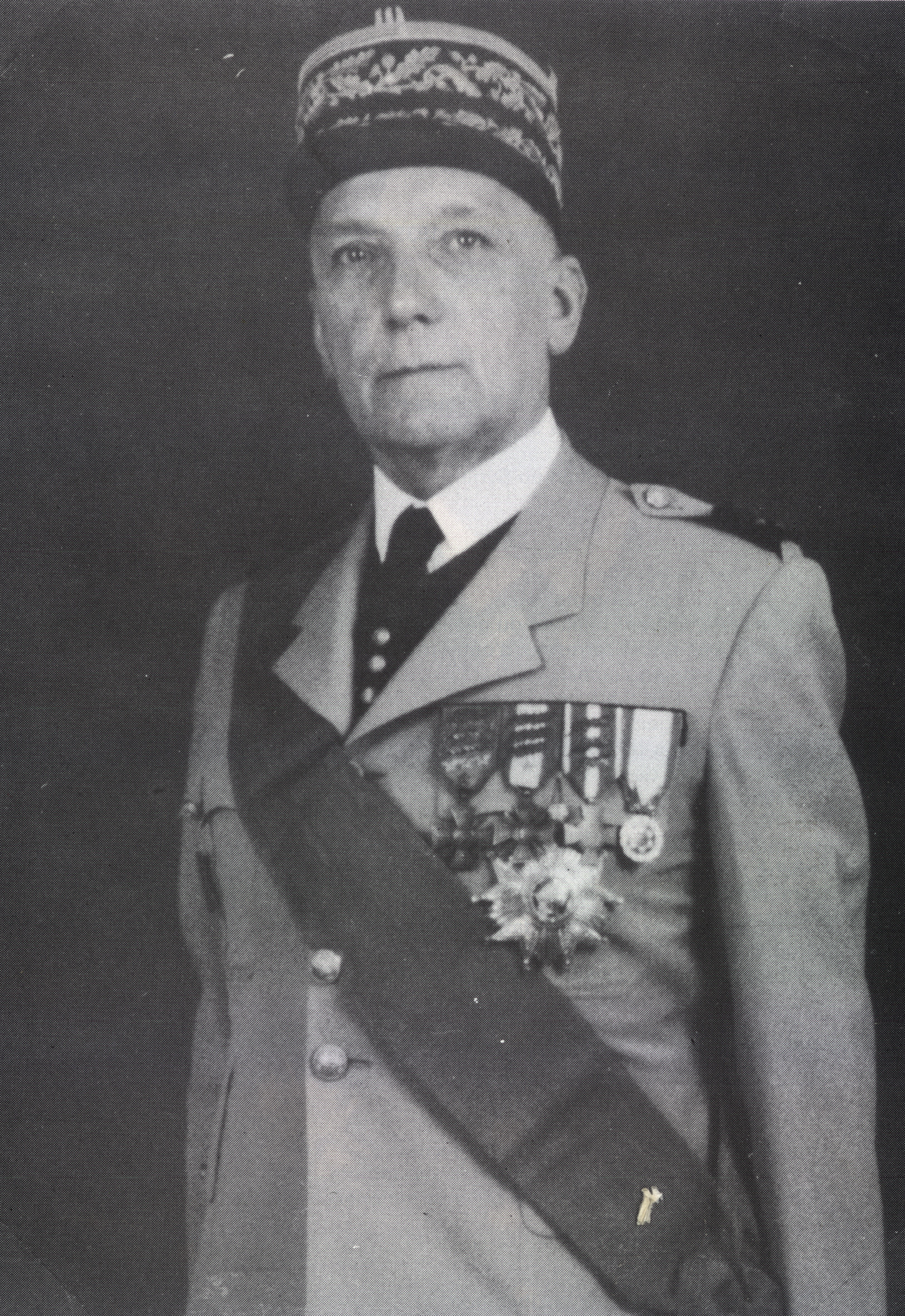 portrait du général français Jean Olié